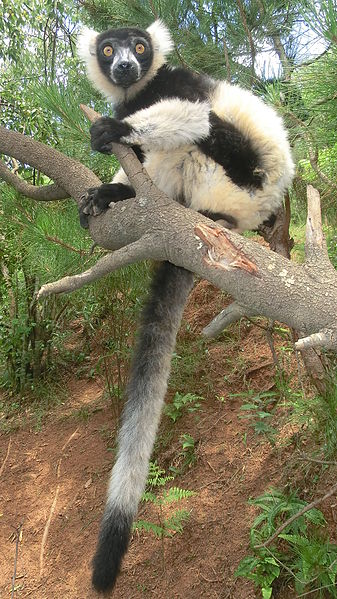 Varecia variegata